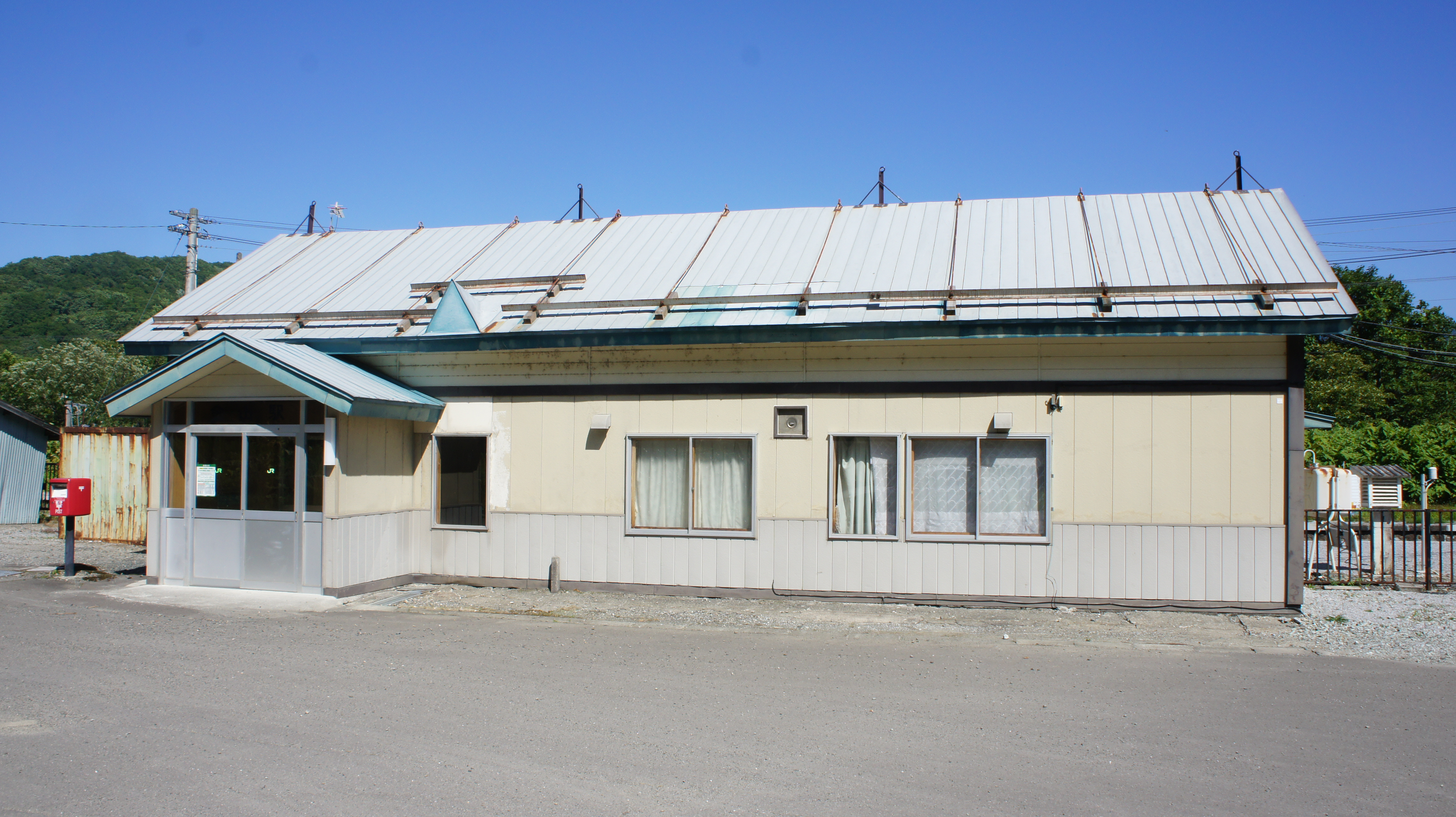 JR根室本線・金山駅の駅舎